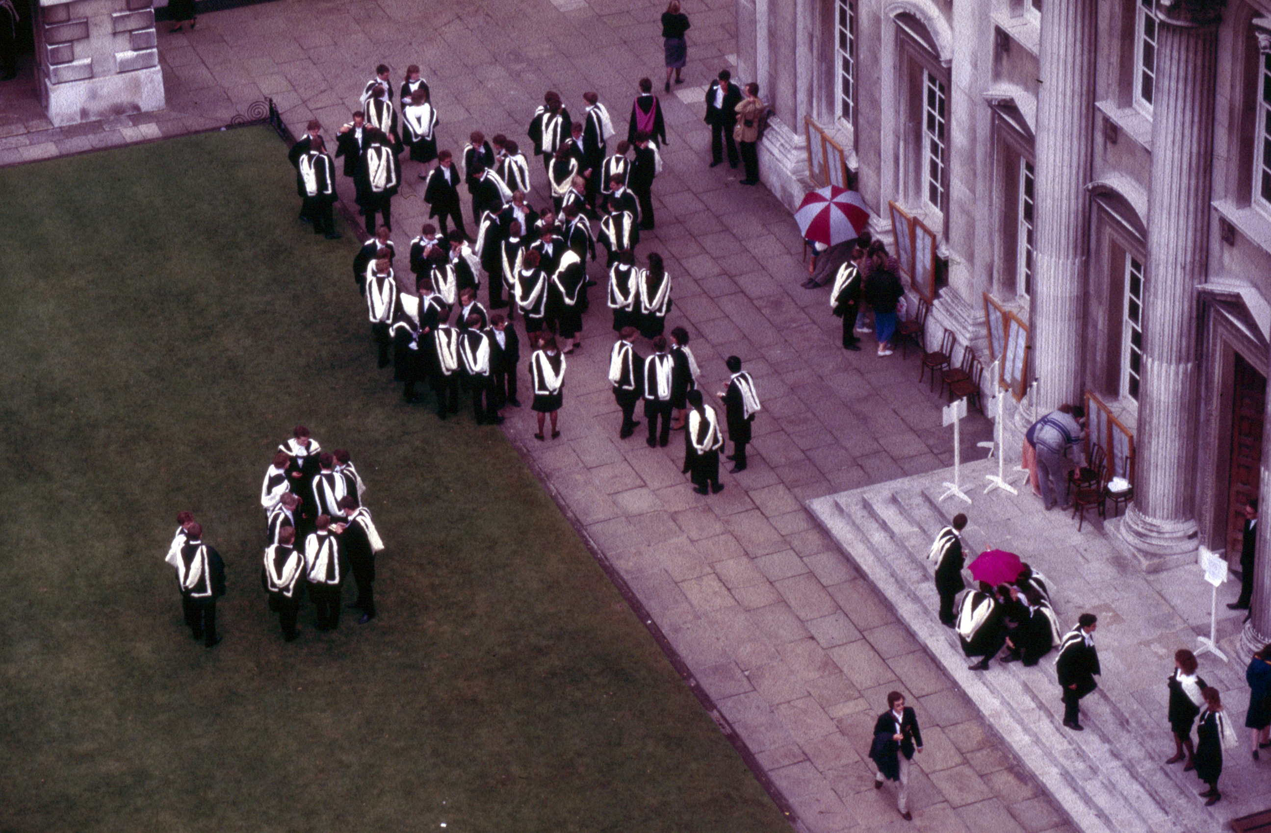 1985 in Cambridge